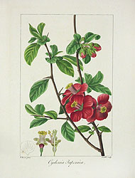 Cydonia japonica